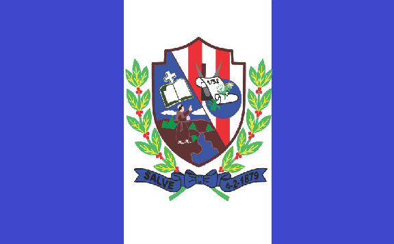 Bandeira do Brejo da Madre de Deus